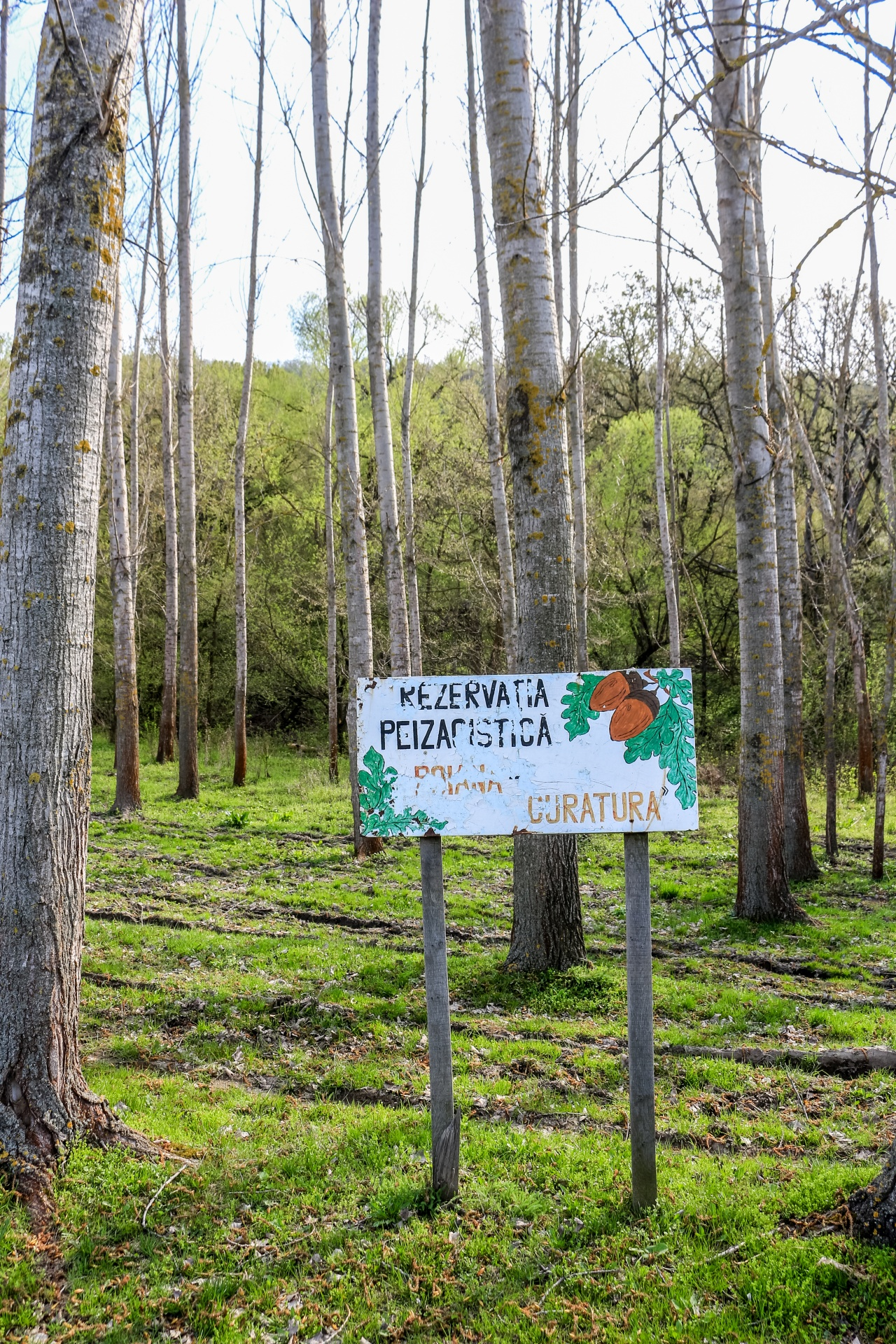 Poiana Curătura, monument al naturii amplasat în raionul Șoldănești, între satele Poiana și Tarasova (raionul Rezina), ocolul silvic Șoldănești, Poiana, parcelele 12, 13; Curătura-Tabora, parcelele 14-17; Curătura-Corn, parcela 18 (cod MD-SD-rp-040)